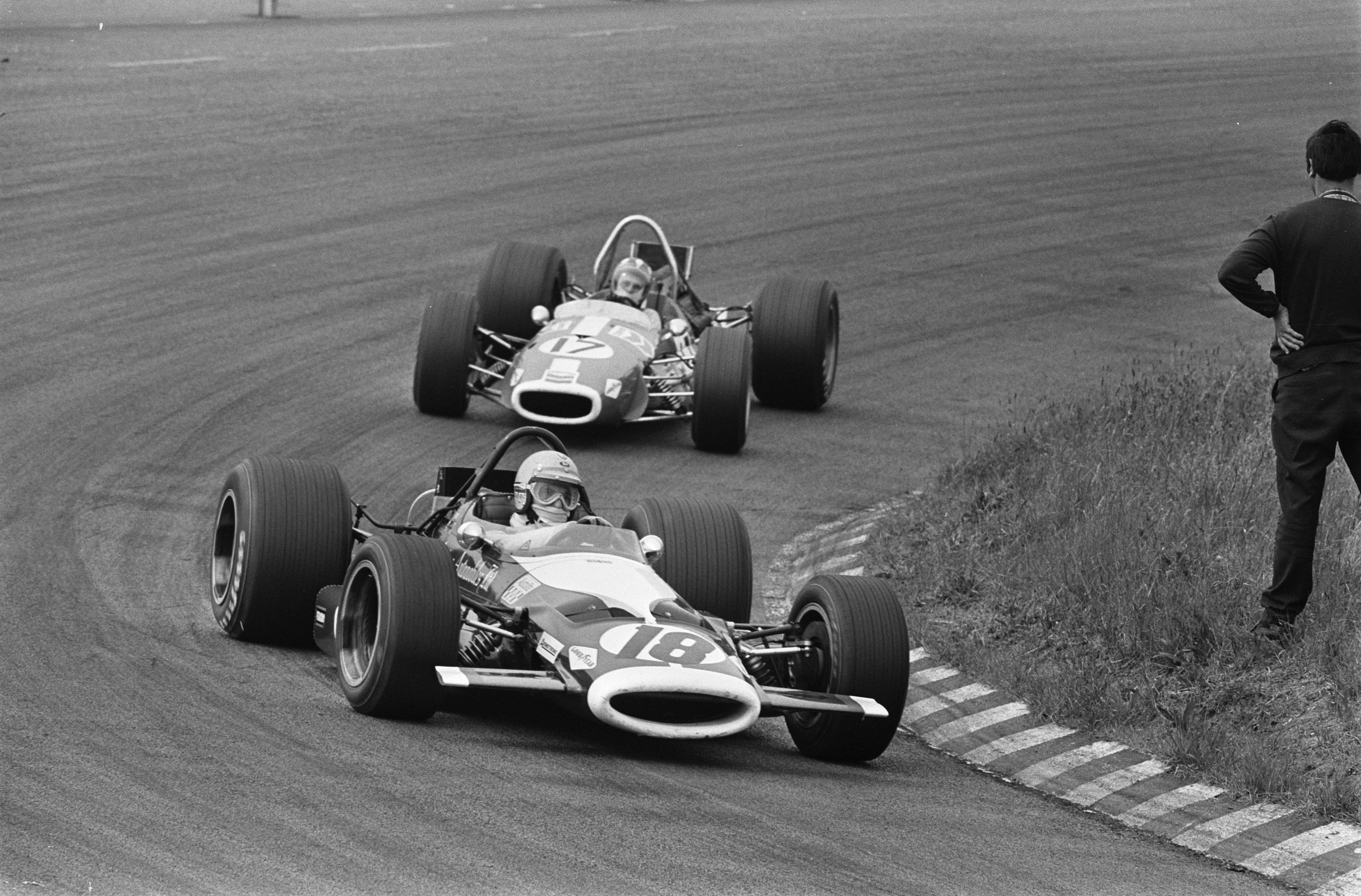 Nrs. 18 en 12 in actie.